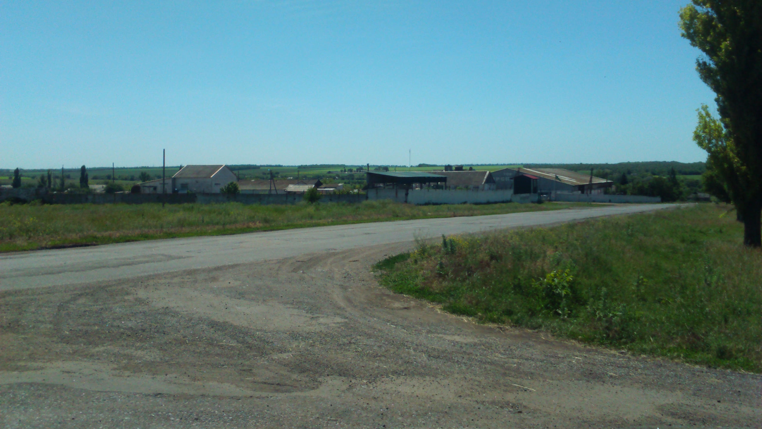 Добропі́лля — село в Україні, Добропільському районі Донецької області, над річкою Водяна.